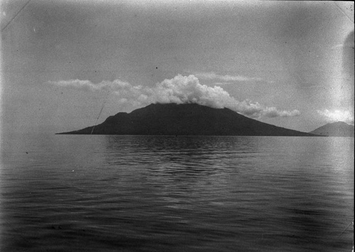 Foto. Foto is genomen tijdens de Wichmann Expeditie naar Noord Nieuw-Guinea. Gezicht op Poelau Makian